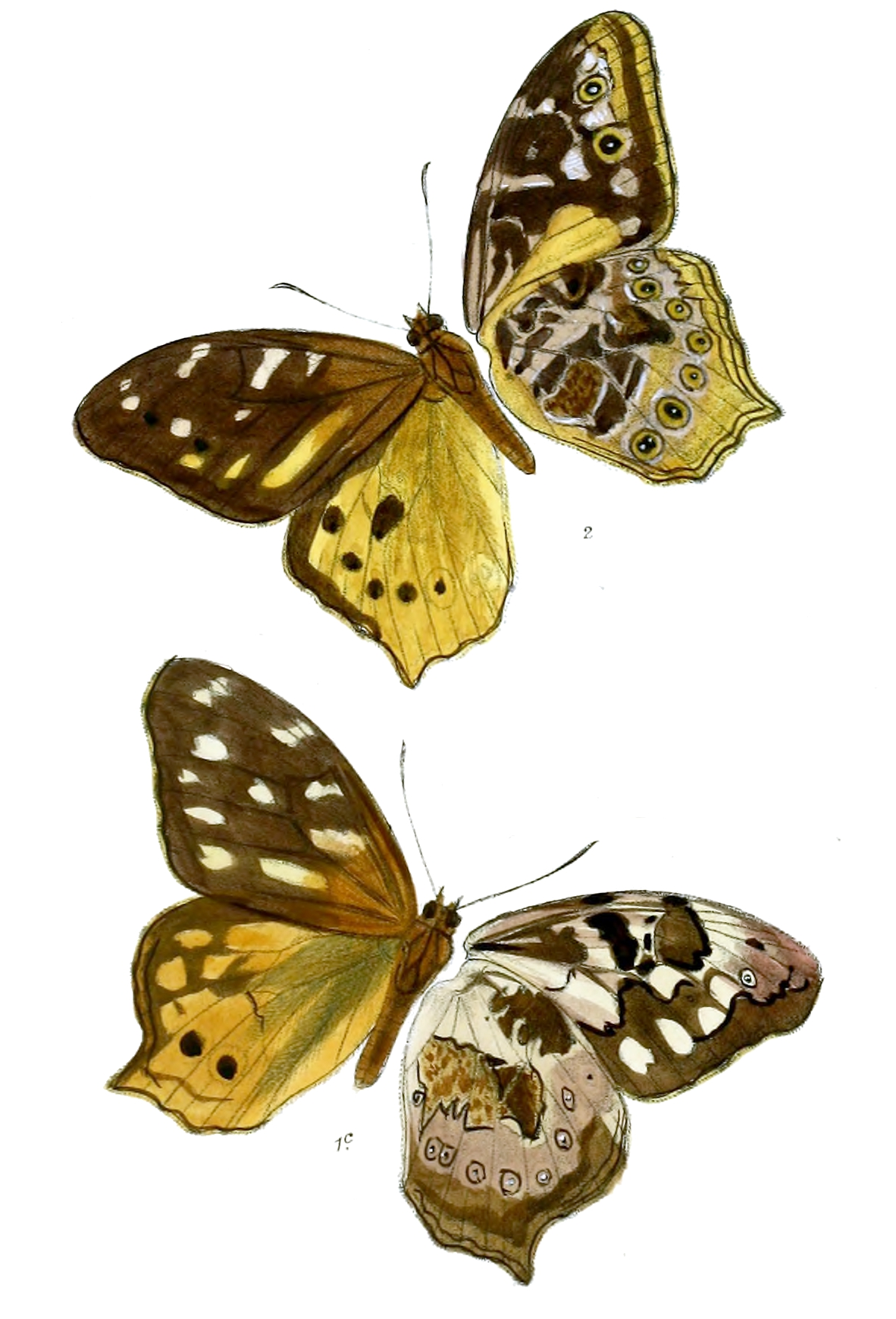 Blanaida khasiana= Neope khasiana